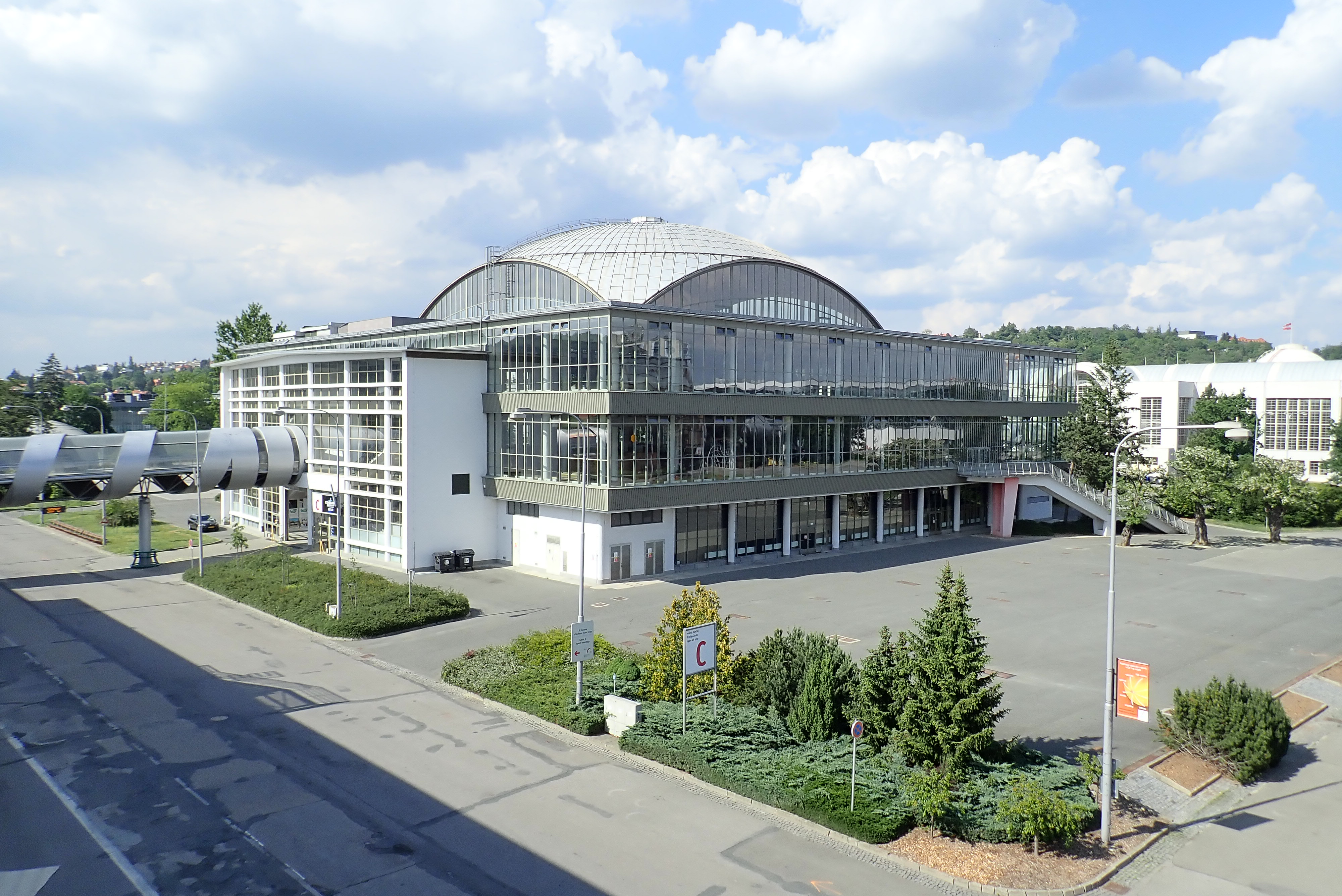 Pavilon C ze schodiště pavilonu E